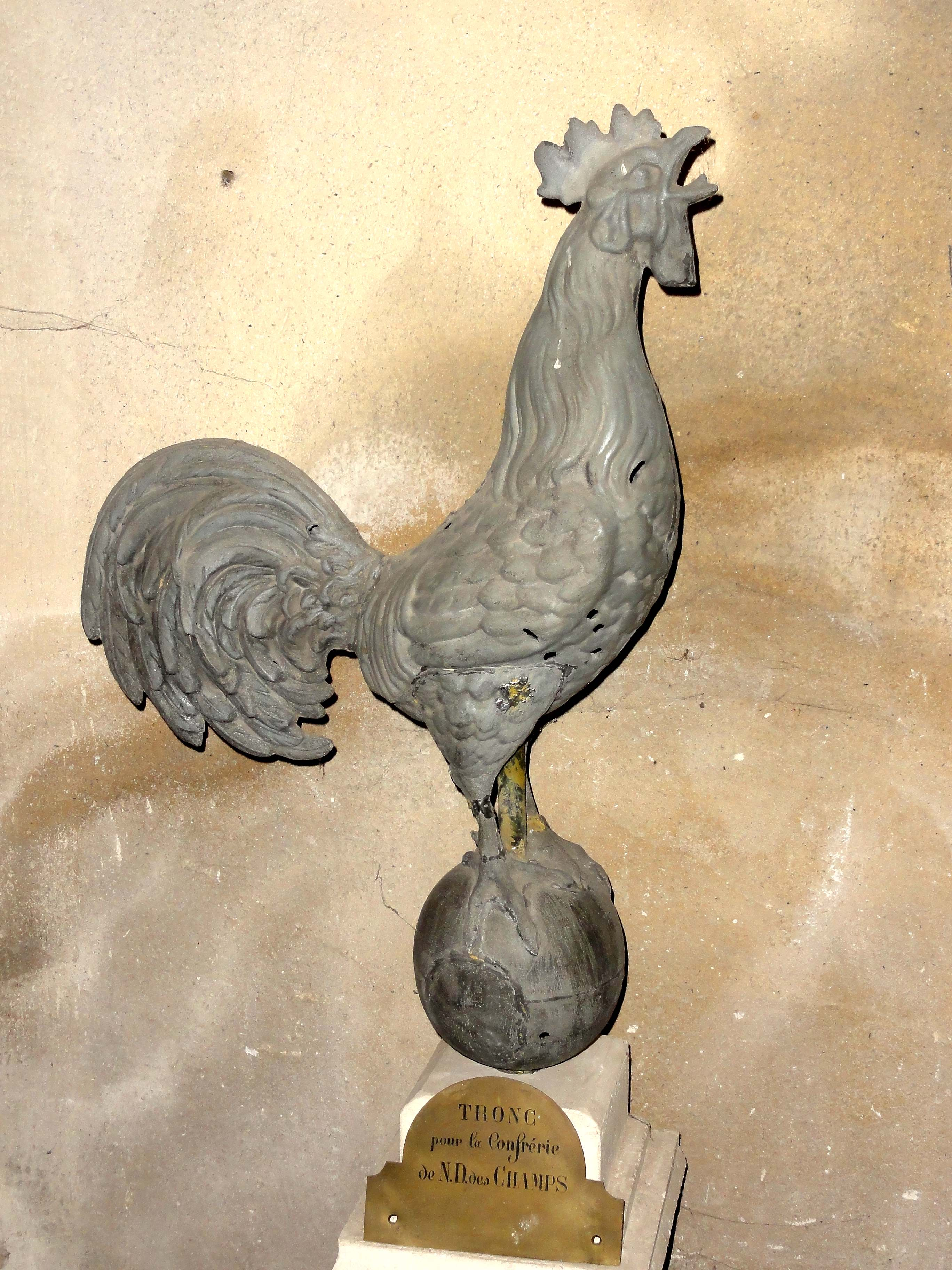 Coq de l'ancienne girouette.